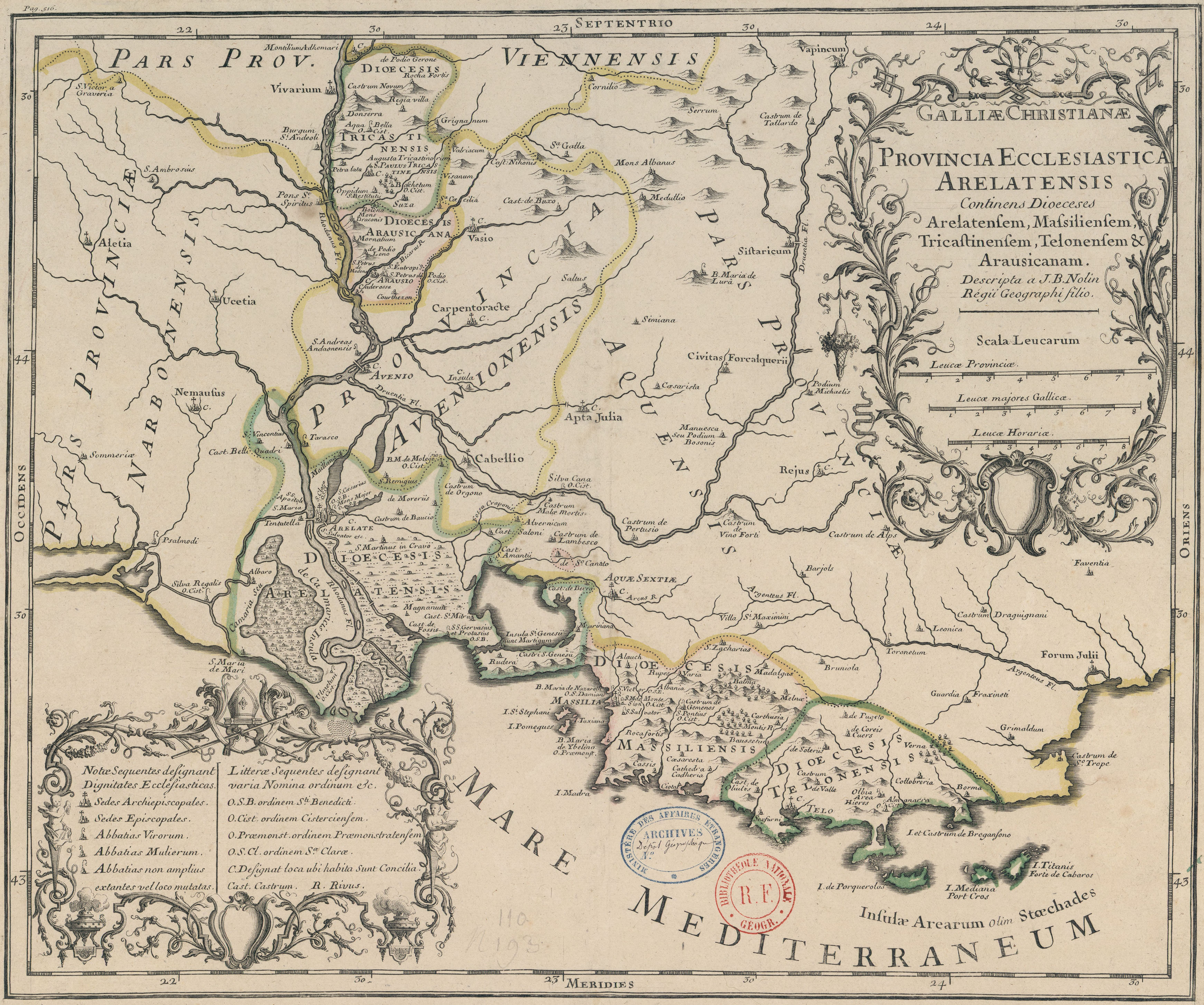 Carte de l'ancienne province ecclésiastique d'Arles, insérée dans le Tome 1 de la Gallia Christiana (1715).